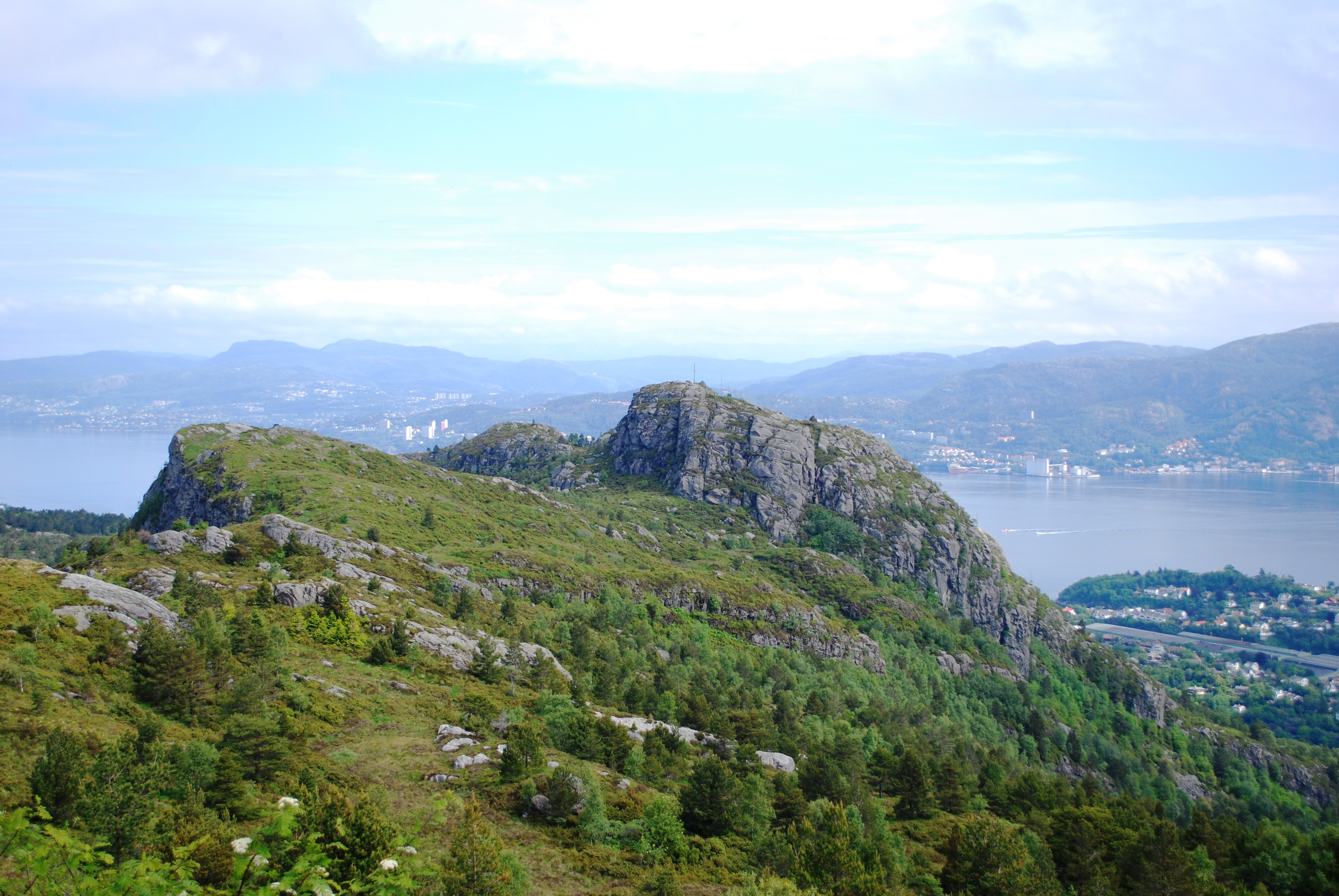 Description=Ørnafjellet